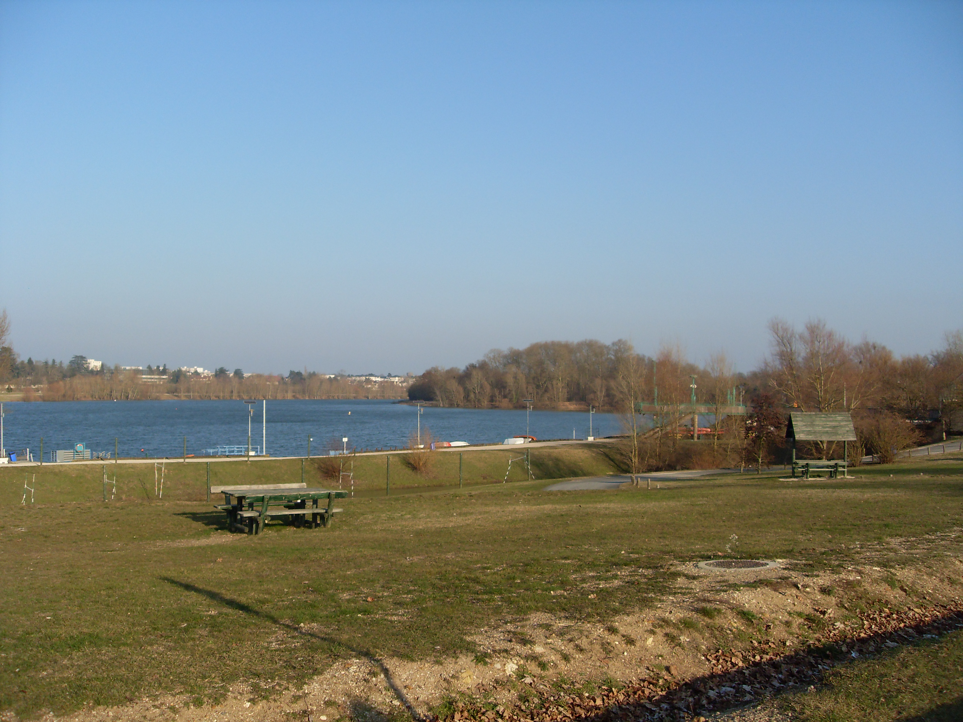 Vue d'ensemble de la base de loisirs de l'Ile Charlemagne